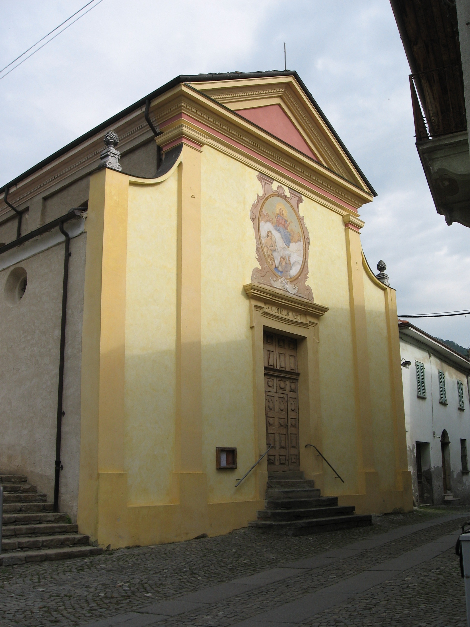 La facciata della Chiesa Parrocchiale di Pezzolo Valle Uzzone, in Provincia di Cuneo